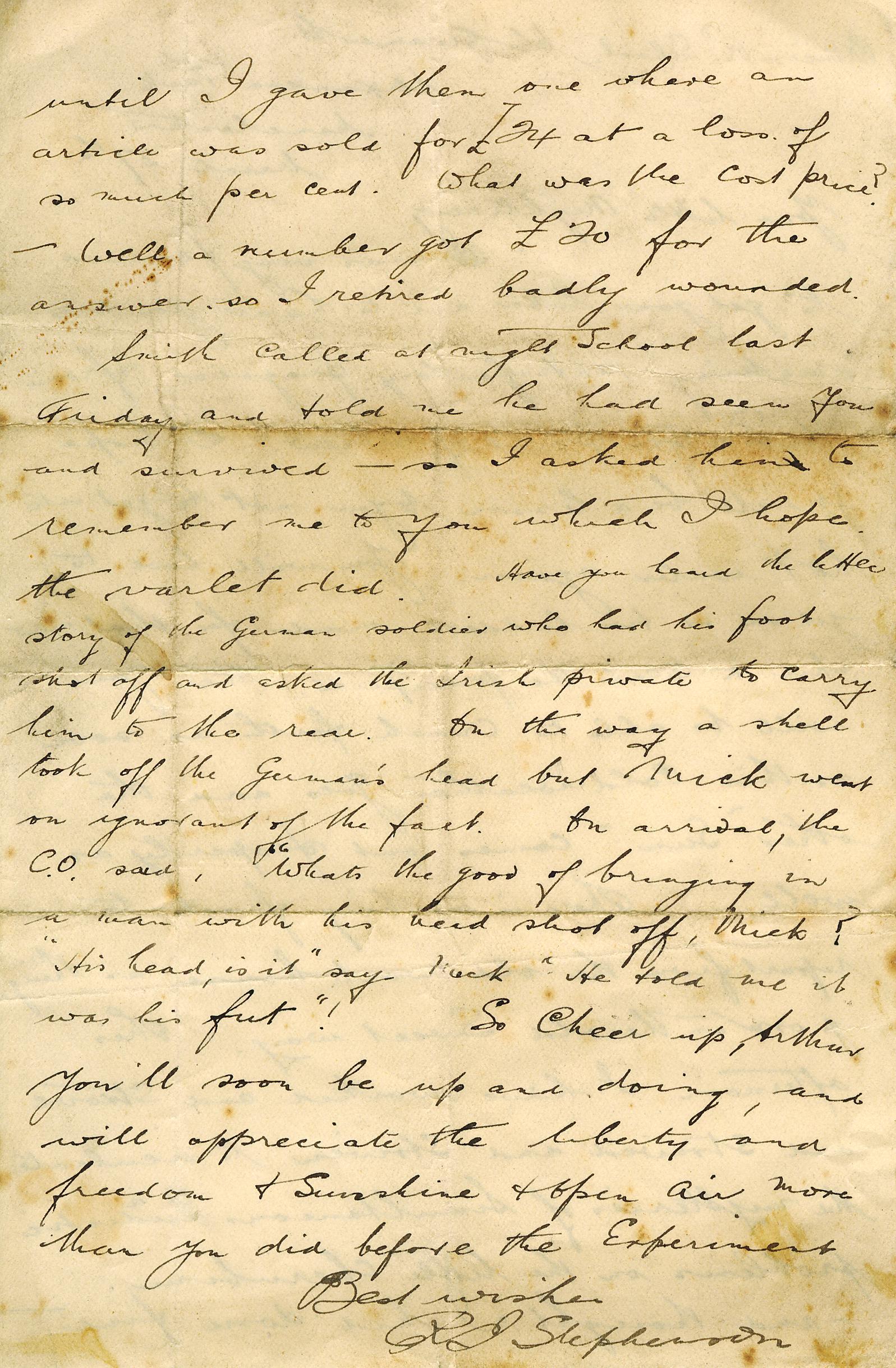 old letter!